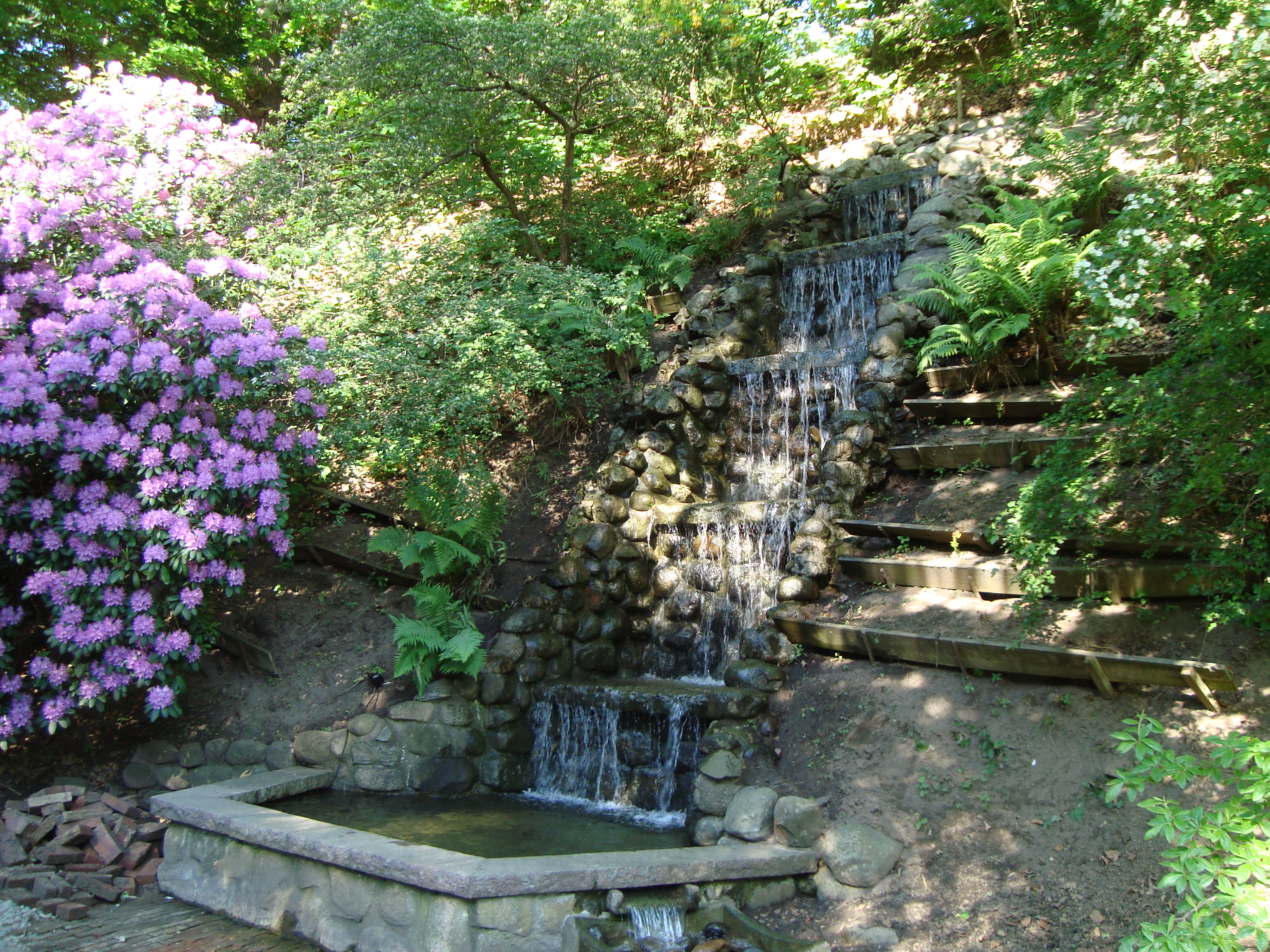 Vattenfall i Öresundparken i Helsingborg.